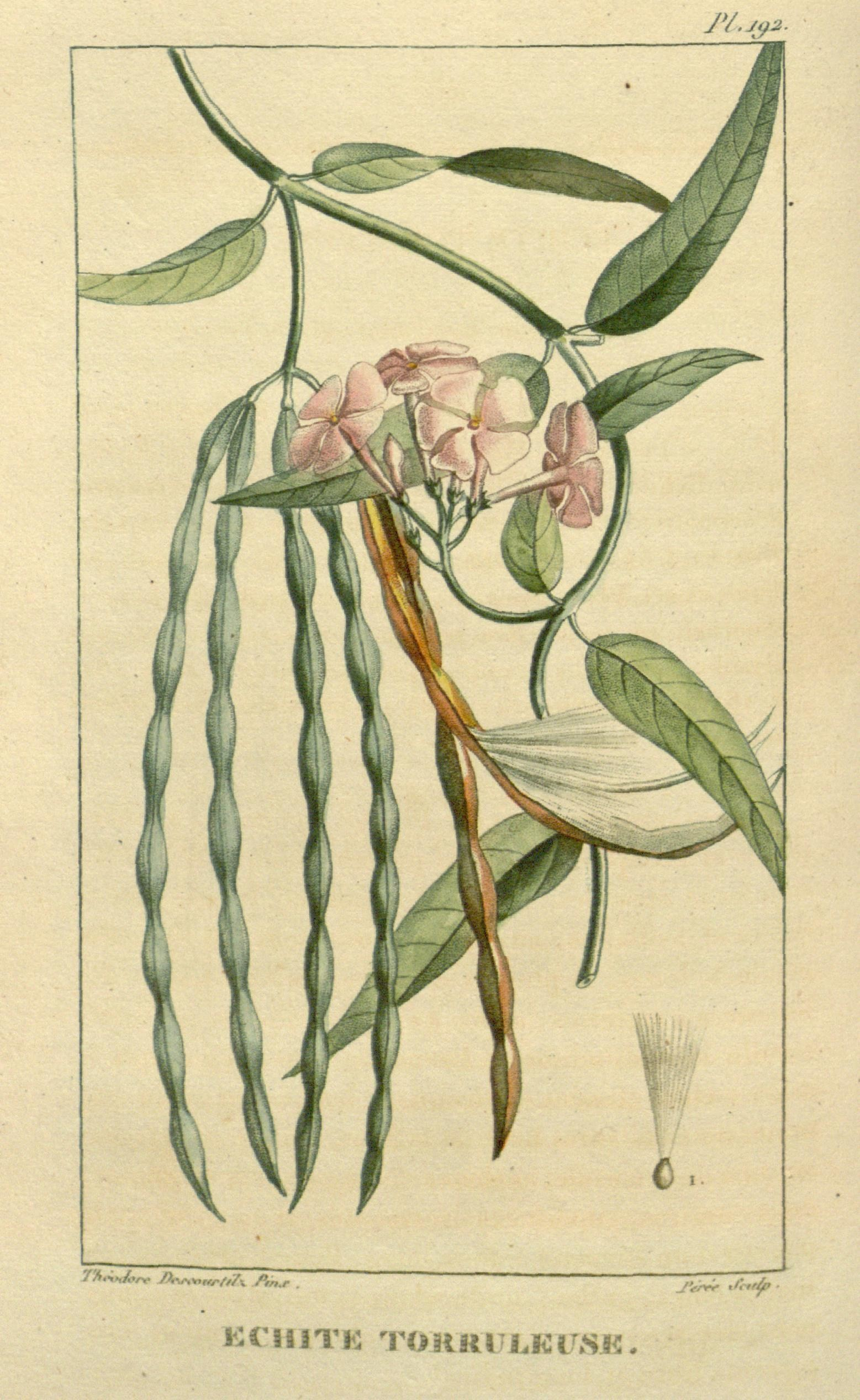 J./.J.^:i. '■■"/• Ki iiJTK TOilRl LKITSK .